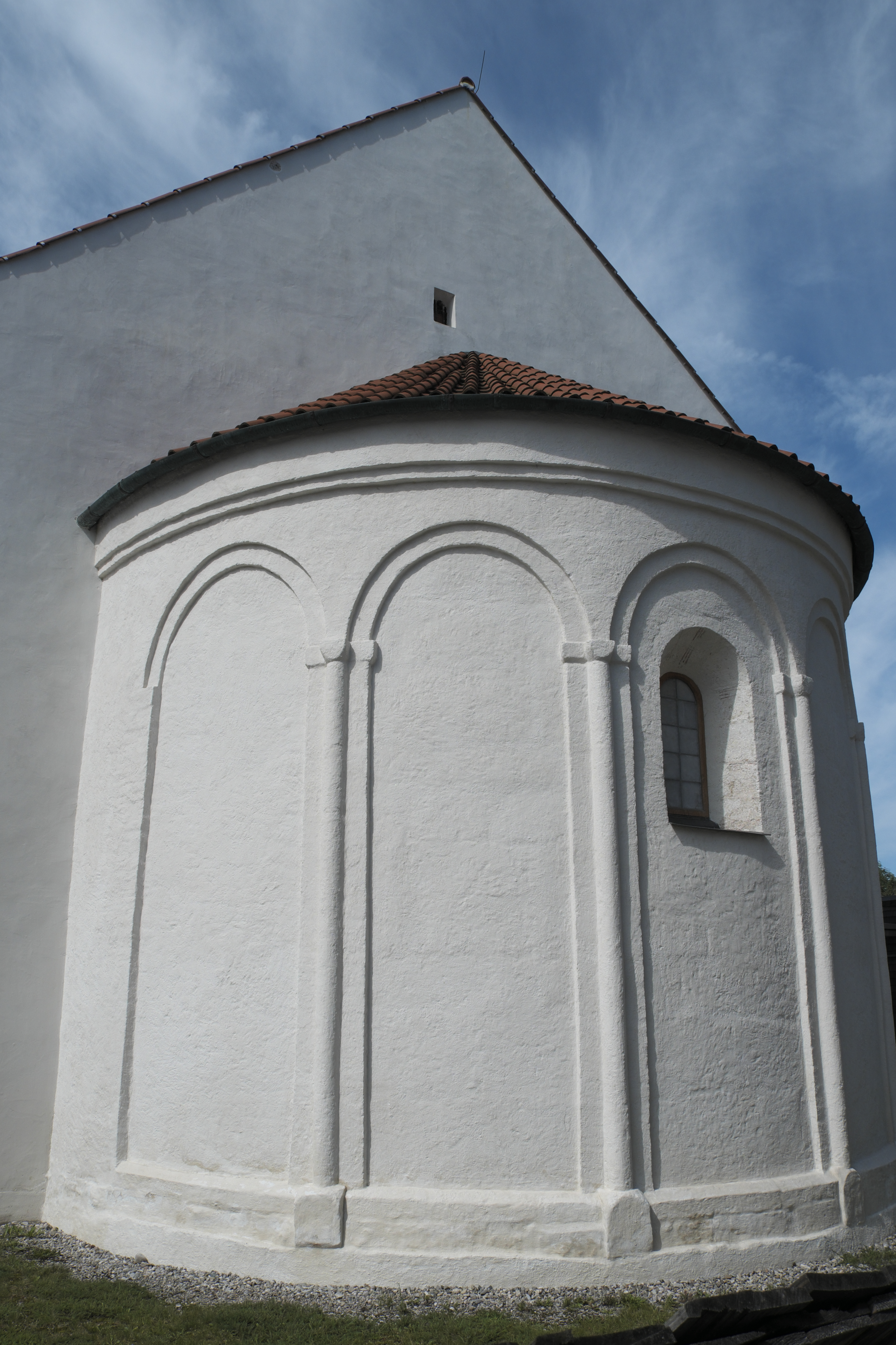 Katholische Filialkirche St. Aegidius in Keferloh (Grasbrunn) im Landkreis München (Bayern/Deutschland), Apsis This is a photograph of an architectural monument.